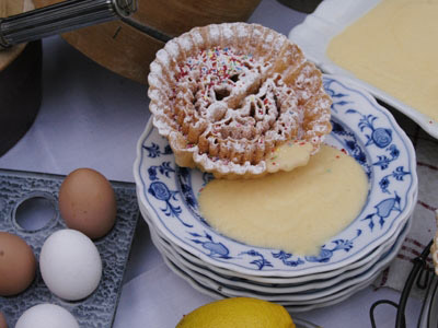 Rosenküchle